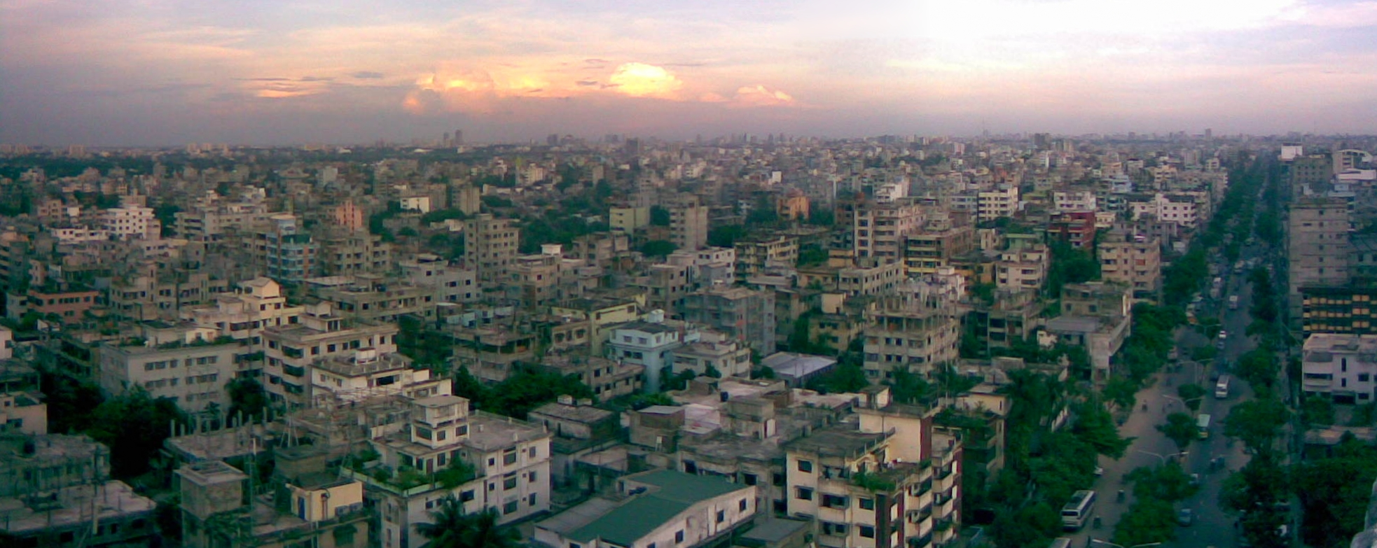 Mishu orion Pallabi, Mirpur, Dhaka, Bangladesh.